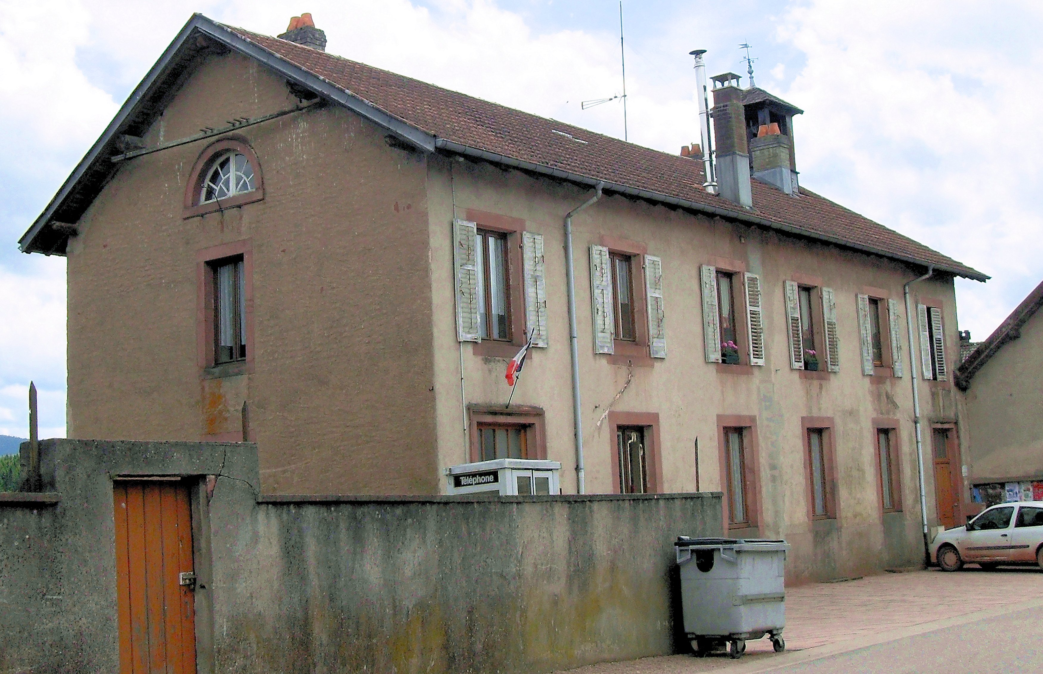 La mairie de Ménil-de-Senones